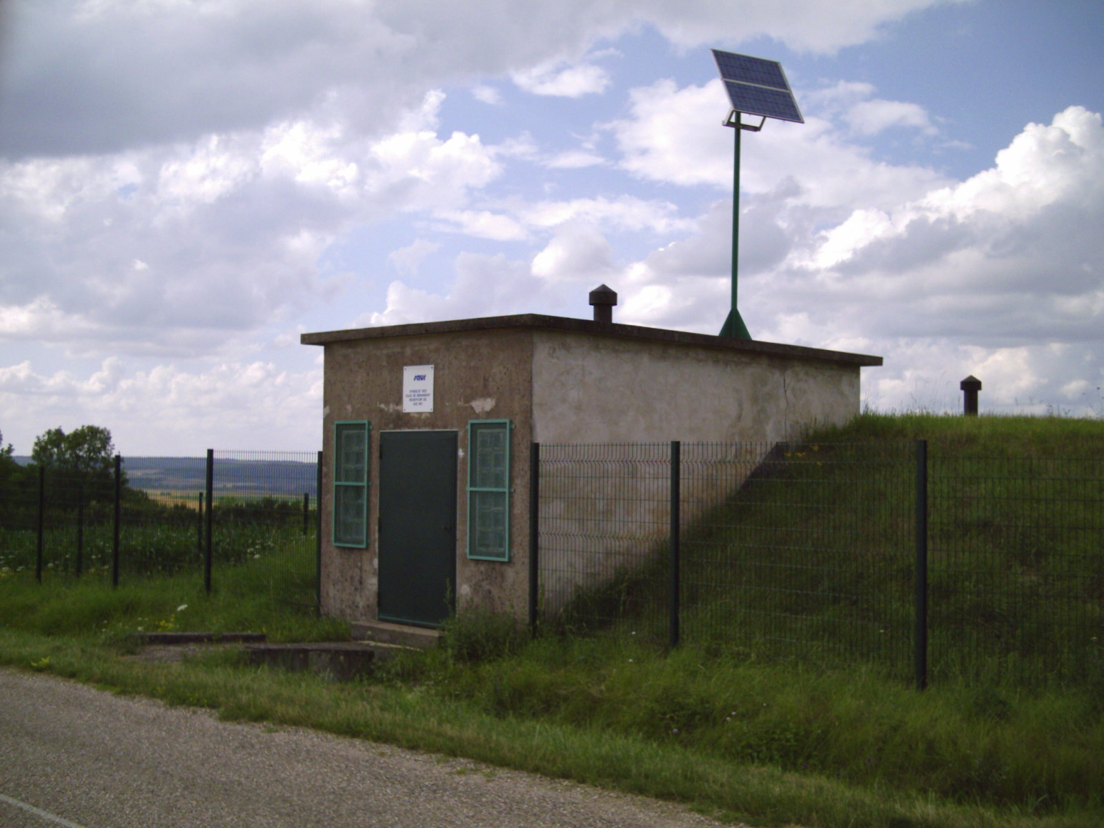 Reservoir d'eau à Juvrecourt (54)